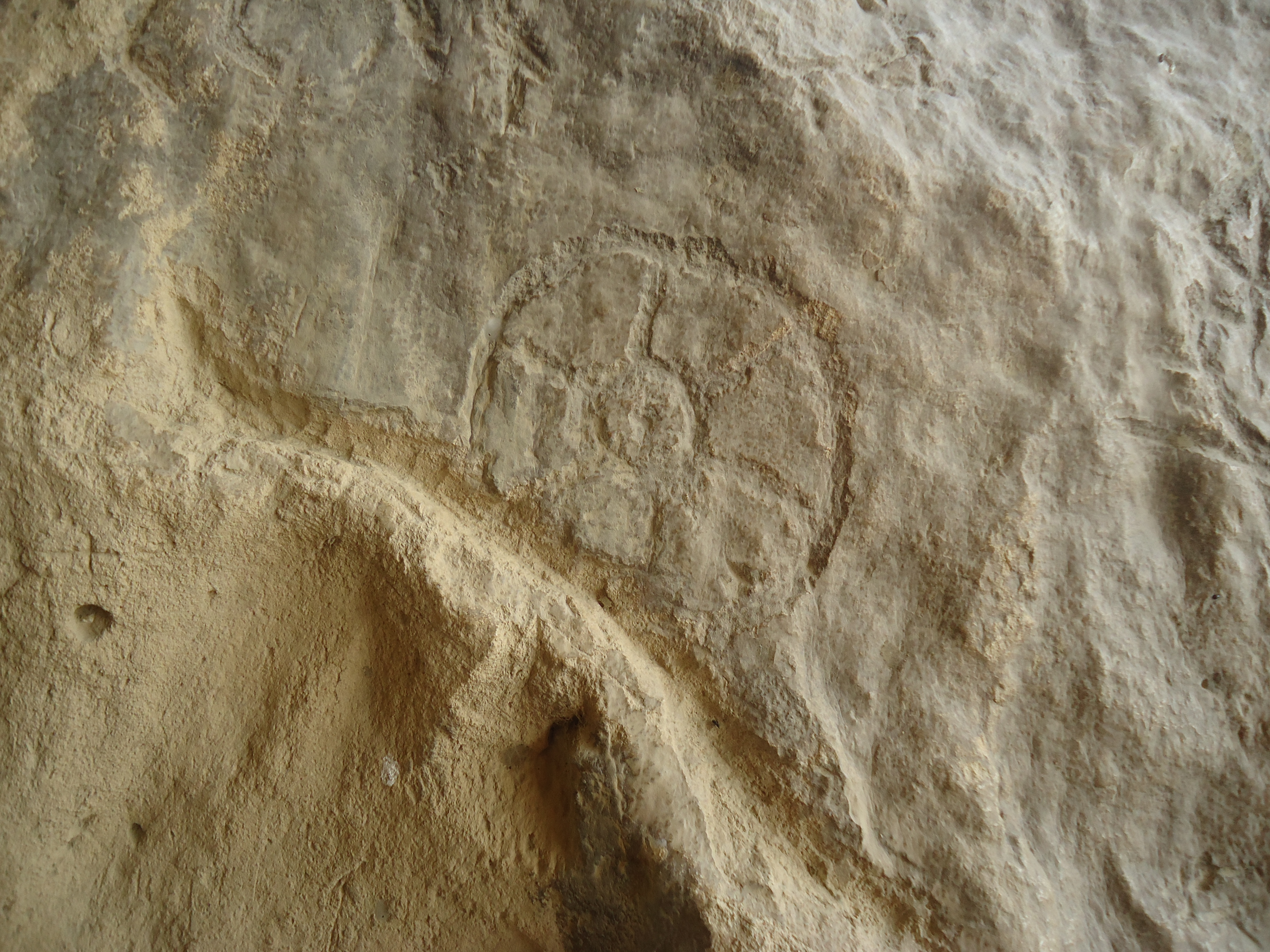 Yazılıtəpədə daş üzərində işarə